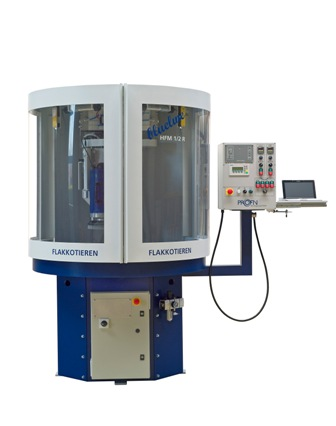 Erste Maschine zur Präzisionskantenverrudung